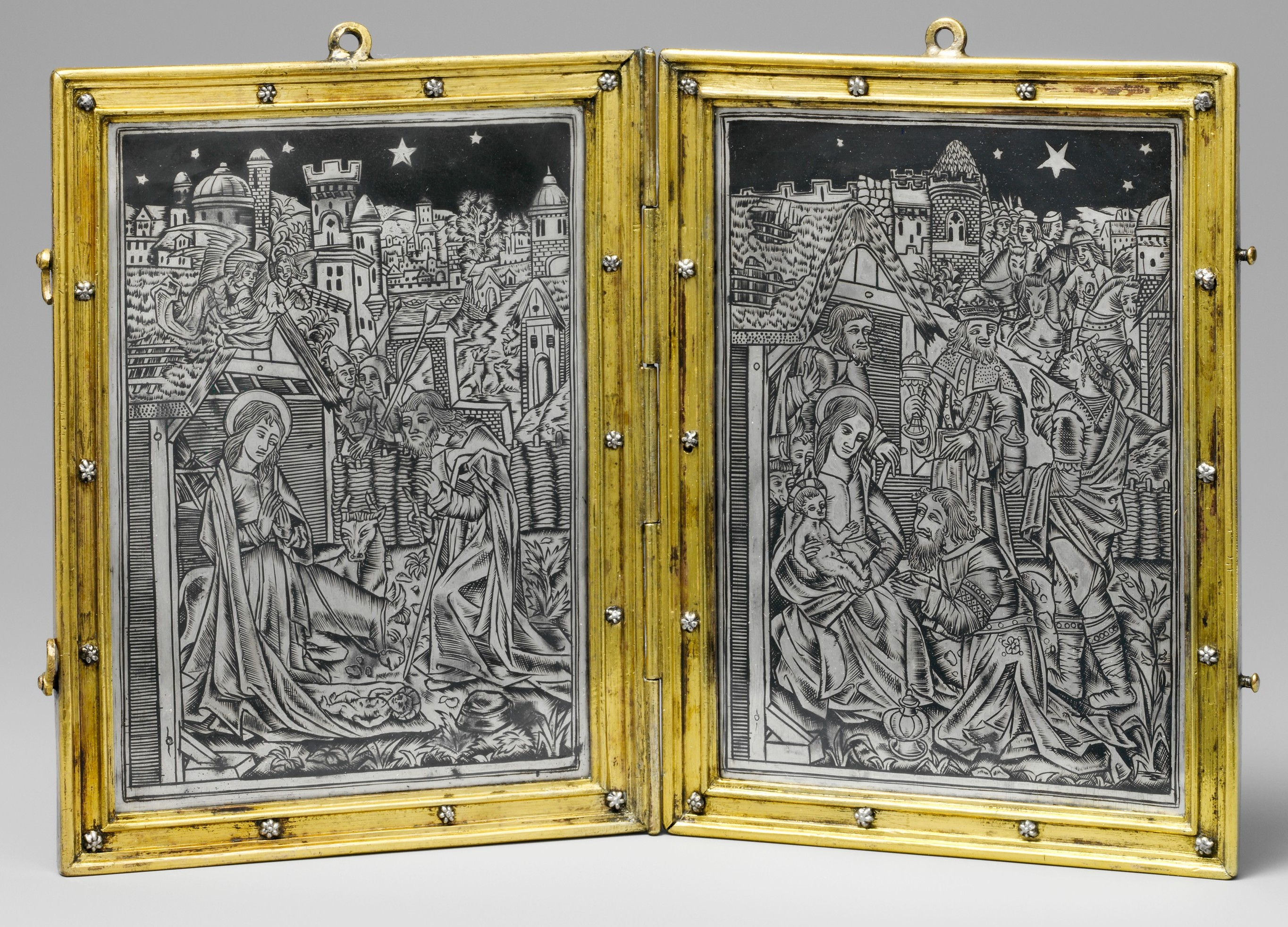 French; Diptych; Metalwork-Silver